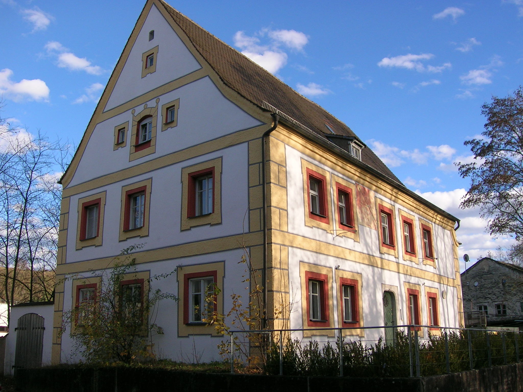 Pater-Moser-Straße 5 Eichstätt: Ehemaliges Klosterrichterhaus.